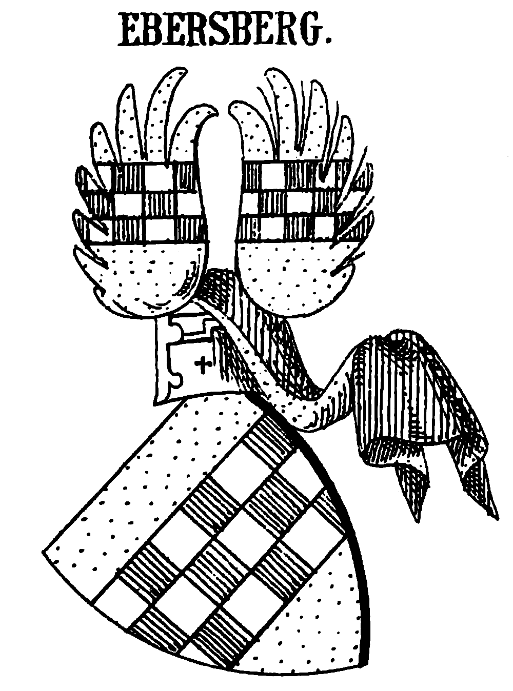 Wappen der Grafen von Ebersberg Blason: In Gold ein von Silber und Rot in drei Reihen geschachter breiter Balken. Auf dem Helm mit rot-goldenen Decken ein wie der Schild bezeichneter offener Flug.